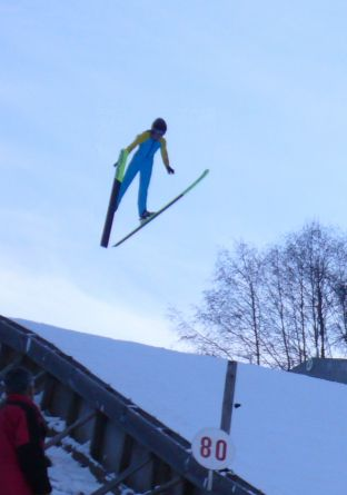 Coline Mattel, ouvreuse de la Coupe de France à Chamonix